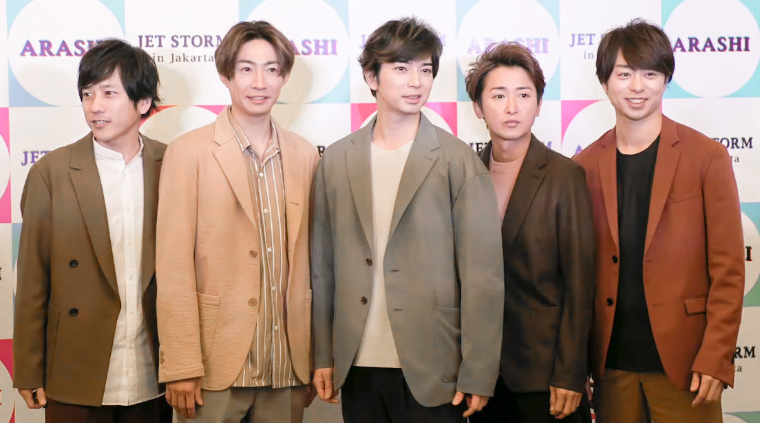 “JET STORM in Jakarta” menjadi pengalaman pertama bagi Arashi @arashi_5_official untuk menyapa para penggemarnya di Indonesia. Acara ini juga merupakan bentuk apresiasi yang diberikan kepada para penggemarnya atas dukungan yang telah diberikan selama 20 tahun, dan sebagai ucapan terima kasih sebelum Arashi hiatus di akhir tahun 2020 mendatang. Kemarin ini, #JSteam berkesempatan untuk datang ke press conference ARASHI di Jakarta. Simak videonya dan jangan lupa untuk support terus yaa!